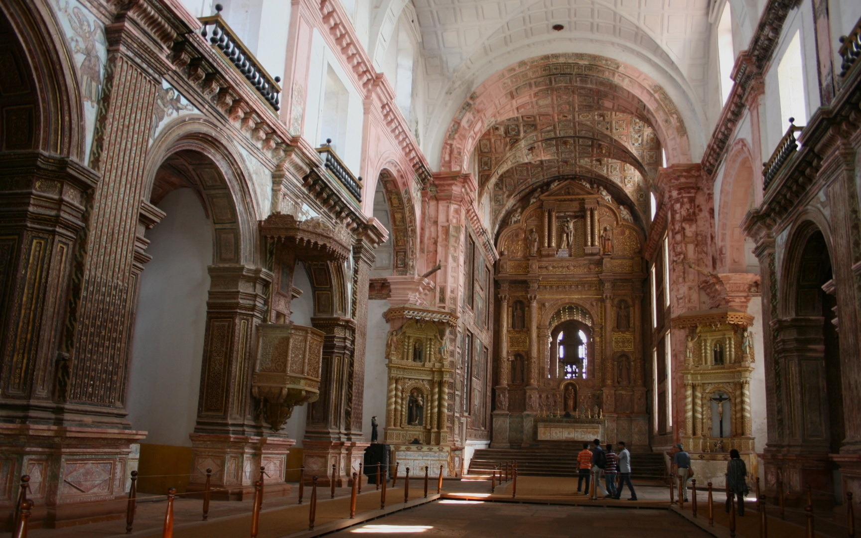 Igreja de São Francisco de Assis (Goa)